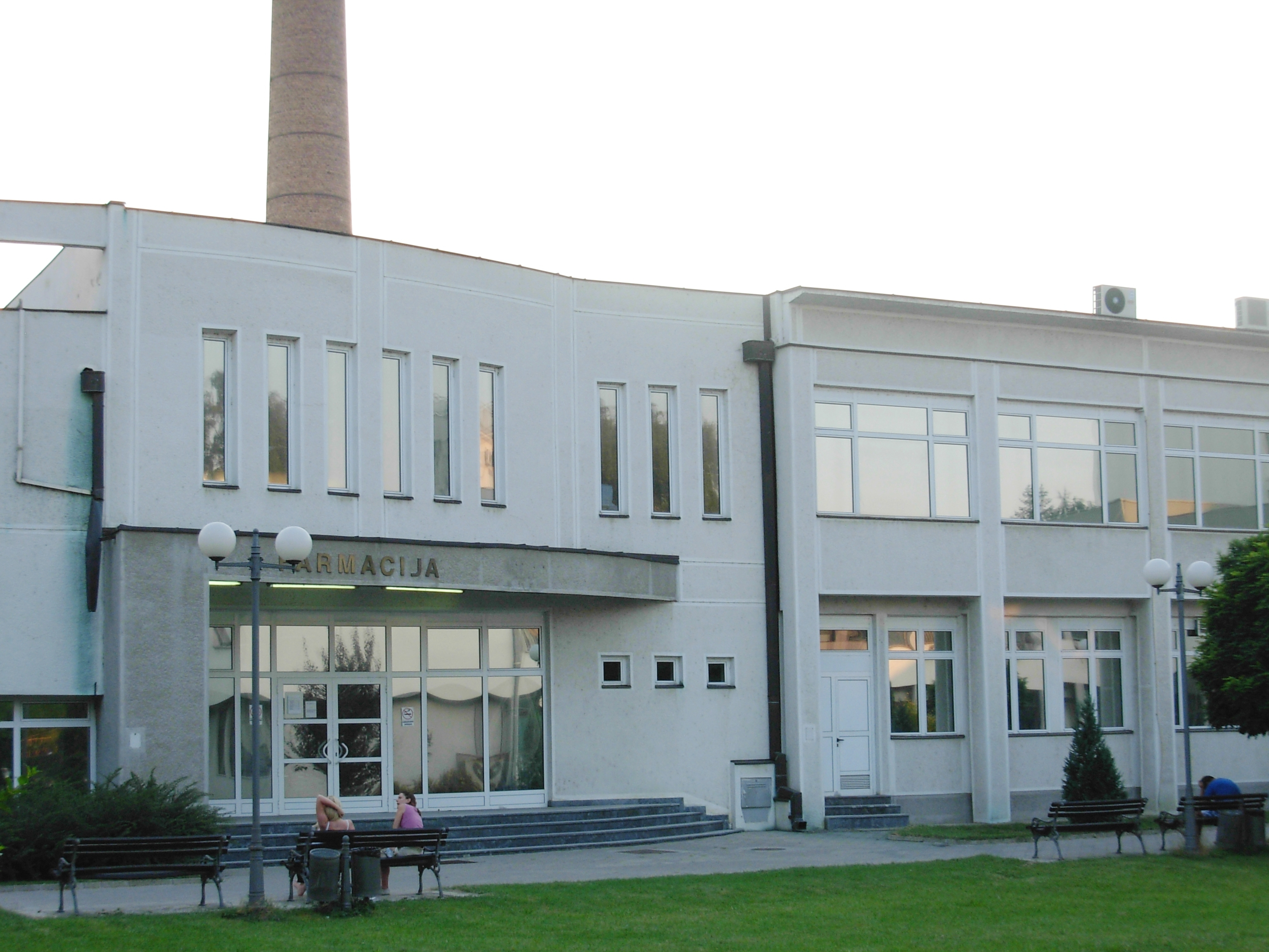 Zgrada farmacije. Medicinski fakultet Univerziteta u Novom Sadu.